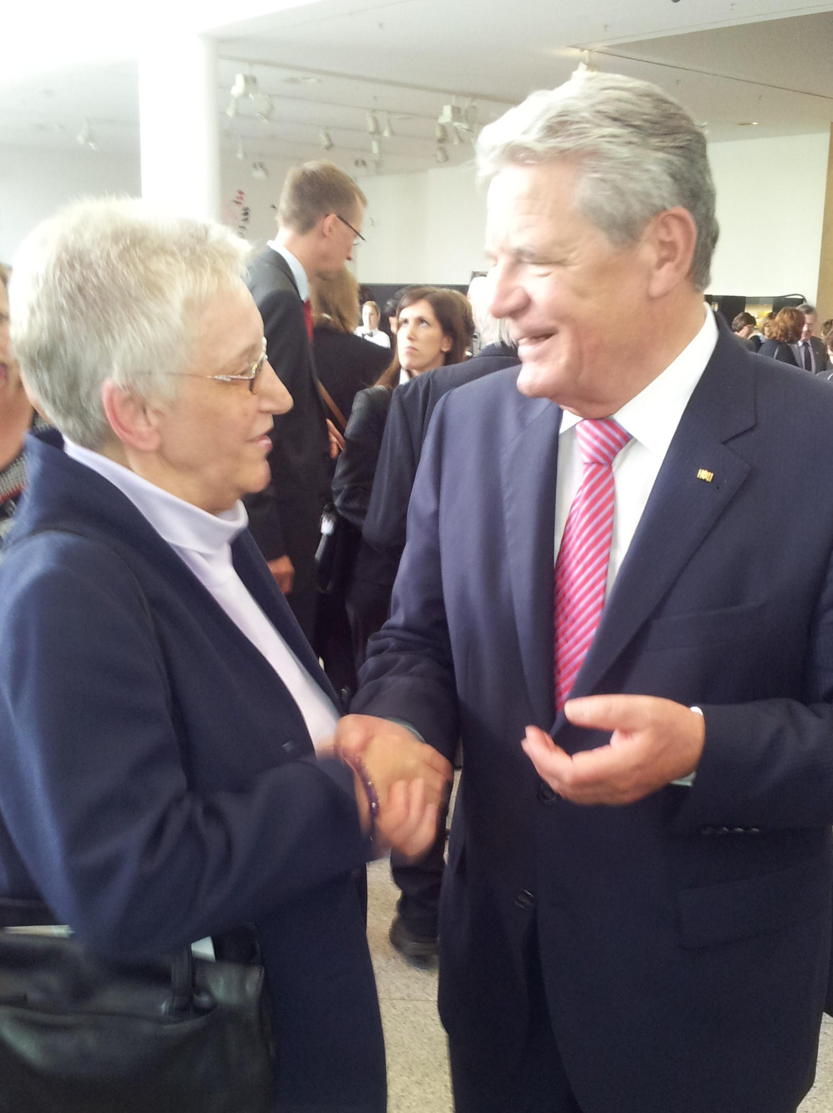 Deitsch: Ehrung von Vorstand Leonore Kremer für ihre OPAM-Arbeit durch Bundespräsident Gauck